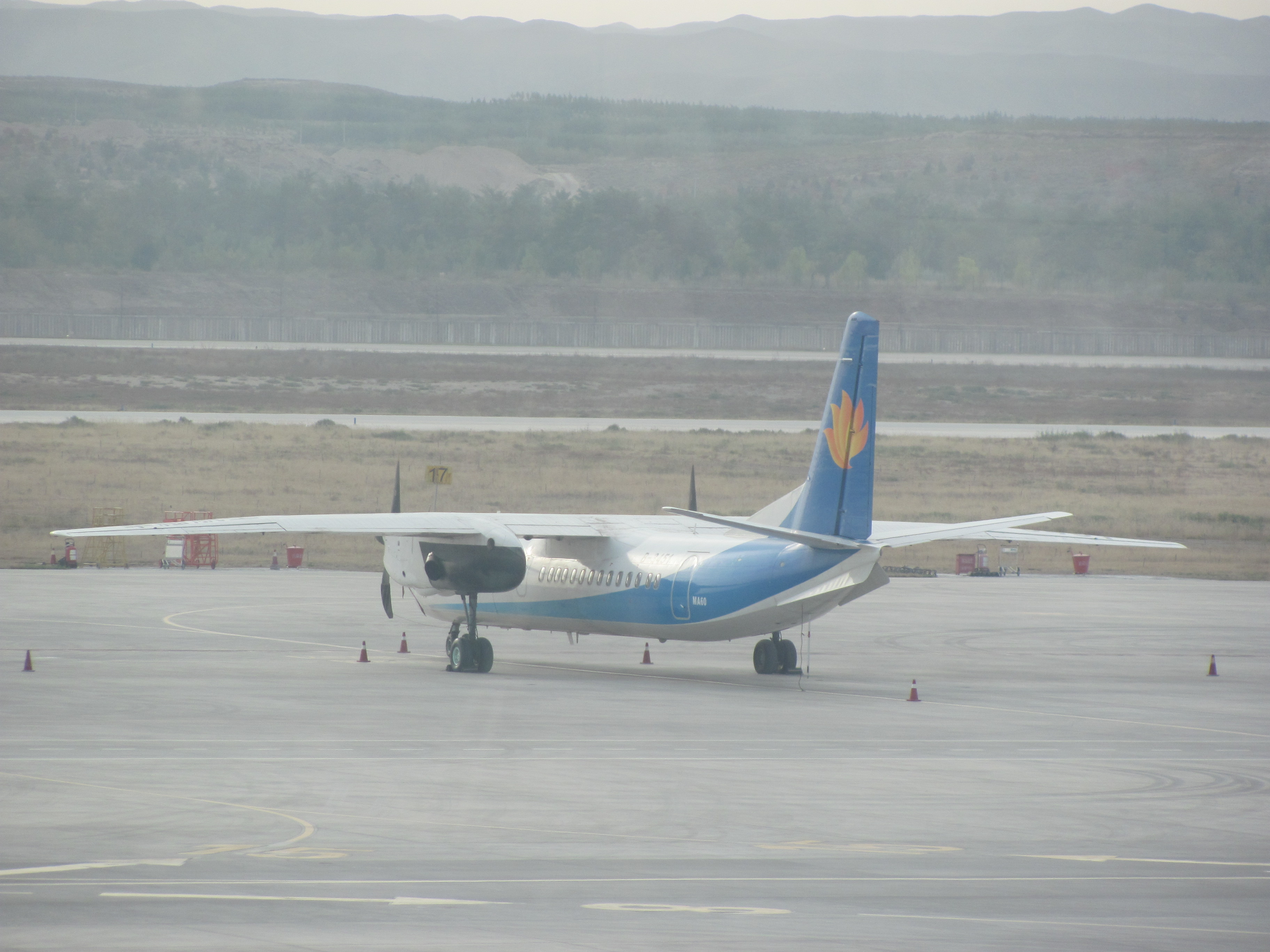 停在银川机场的幸福航空新舟60飞机